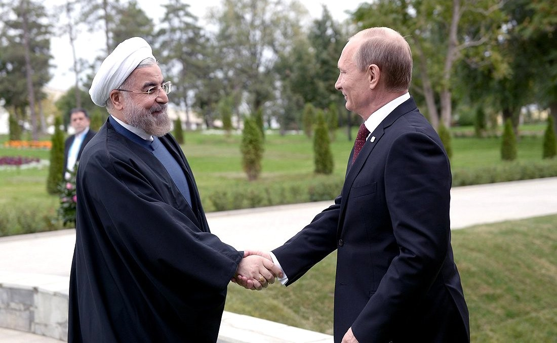 IV Каспийский саммит. Перед началом IV Каспийского саммита. С Президентом Ирана Хасаном Рухани.